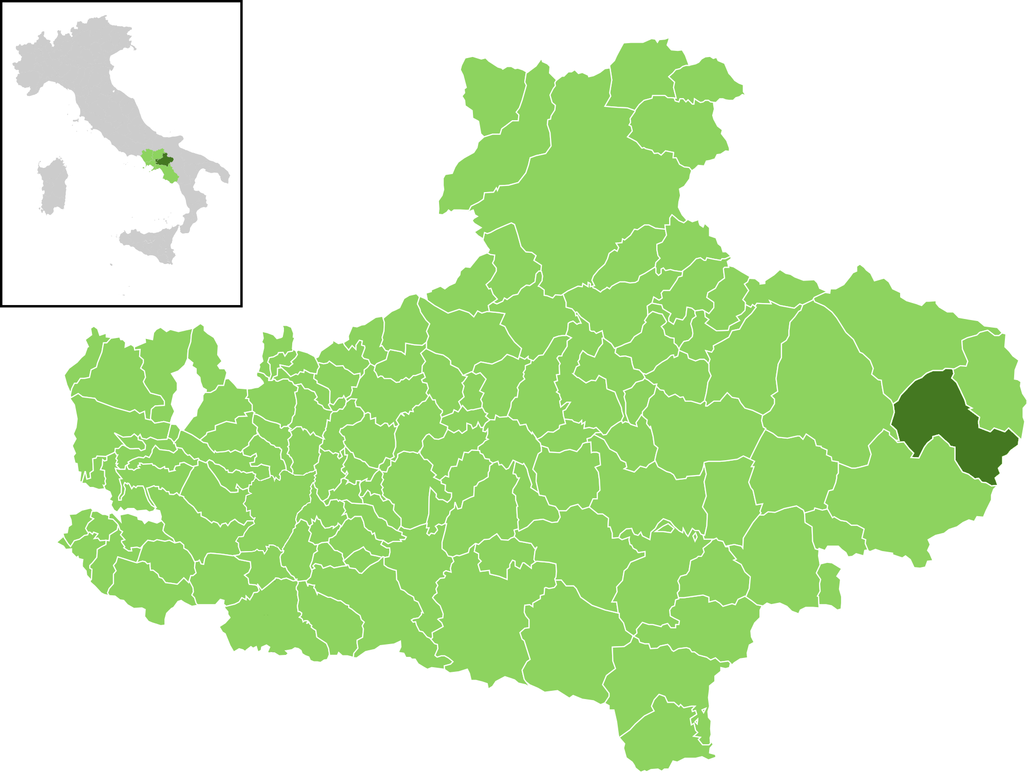 Il comune all'interno della provincia di Avellino